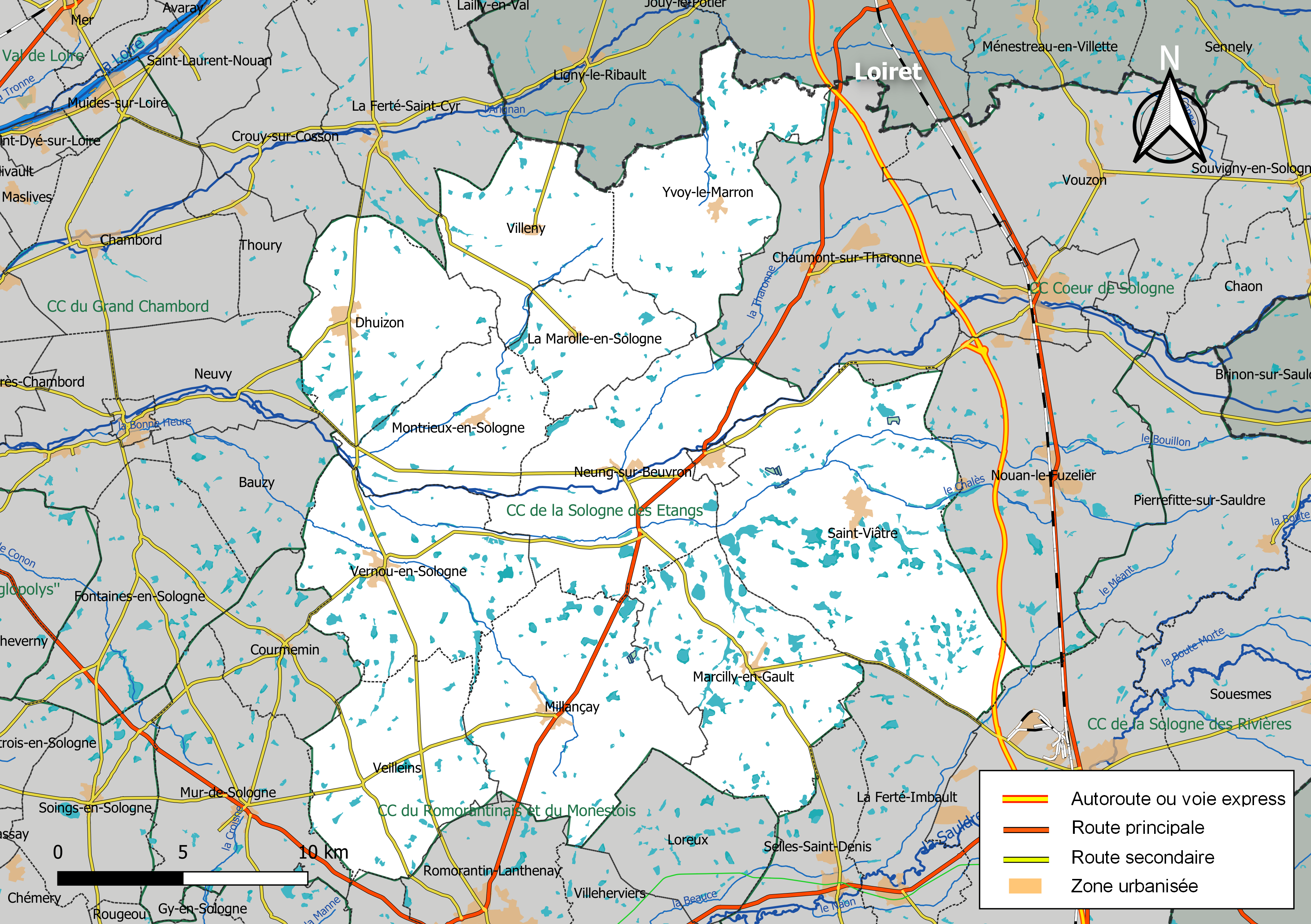 Carte de la communauté de communes de la Sologne des étangs, département de Loir-et-Cher, France. Composition au 1er janvier 2019.